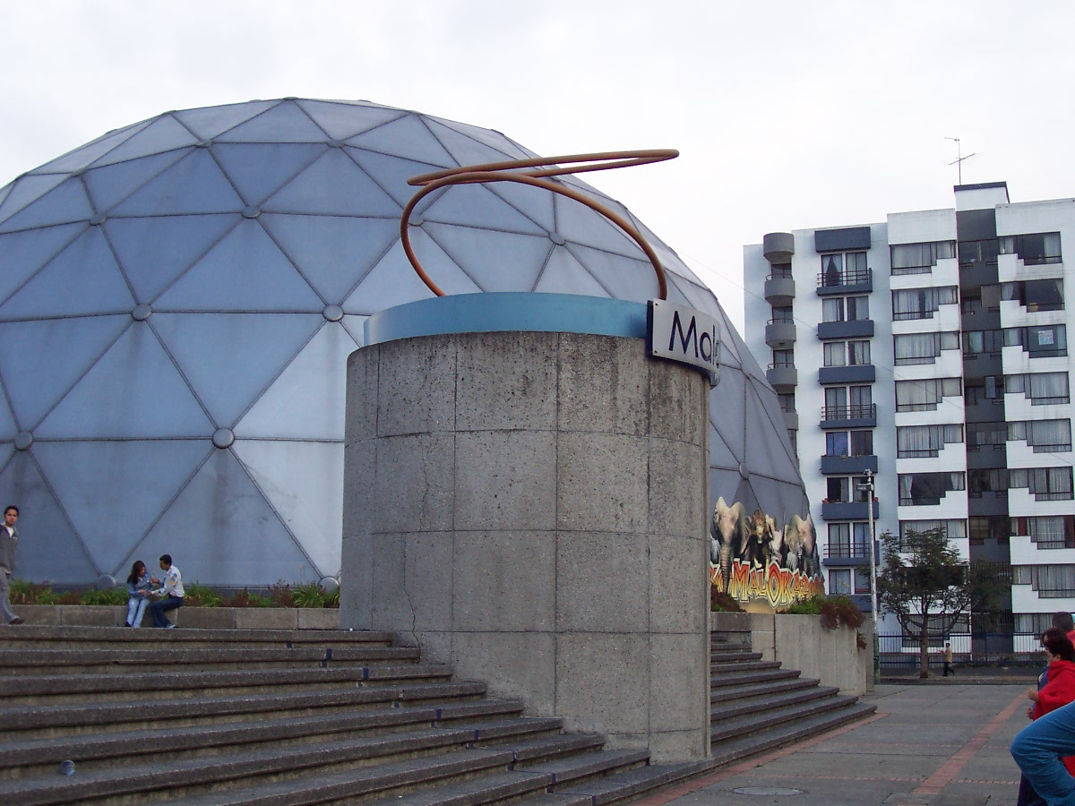 Vista del Cine domo de Maloka en Bogotá